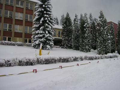 škola v zime